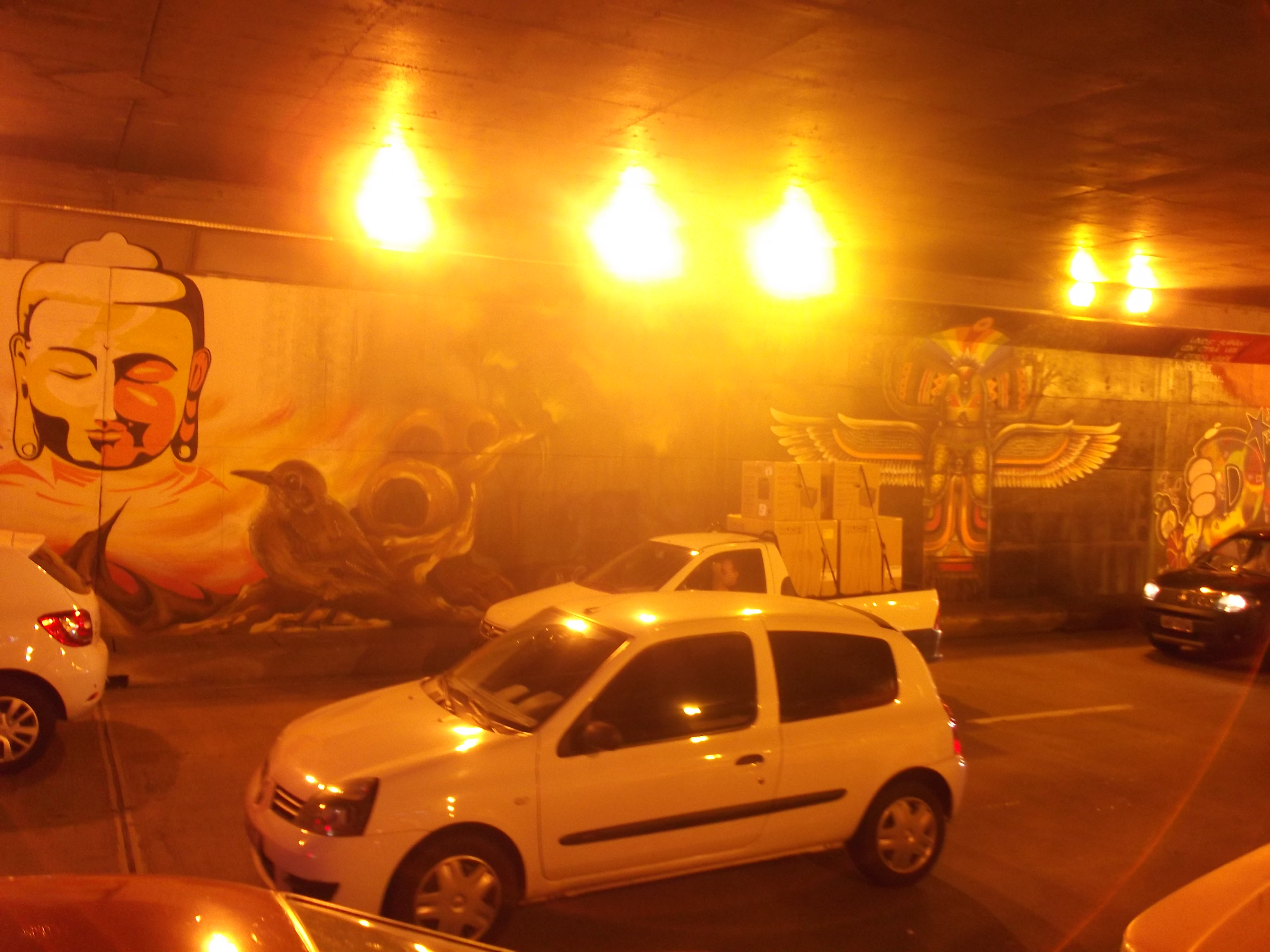 Túnel e Elevada da Conceição, Porto Alegre, Brasil